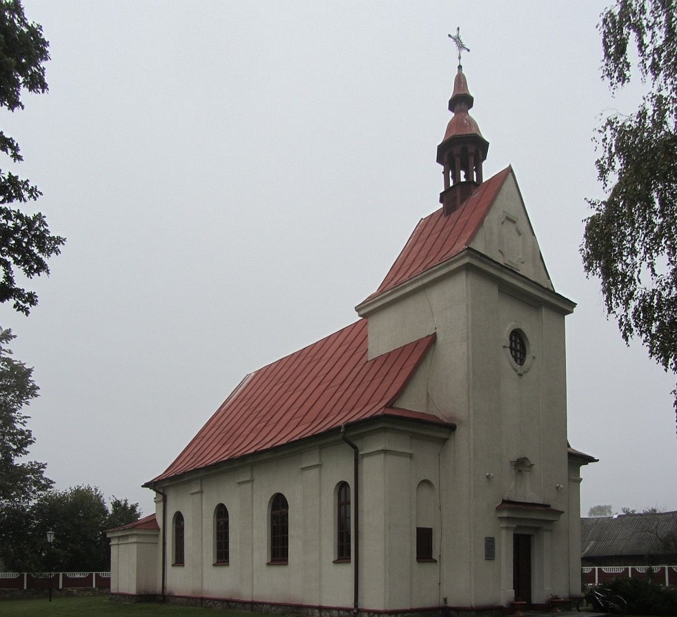 Пелішча. Касцёл